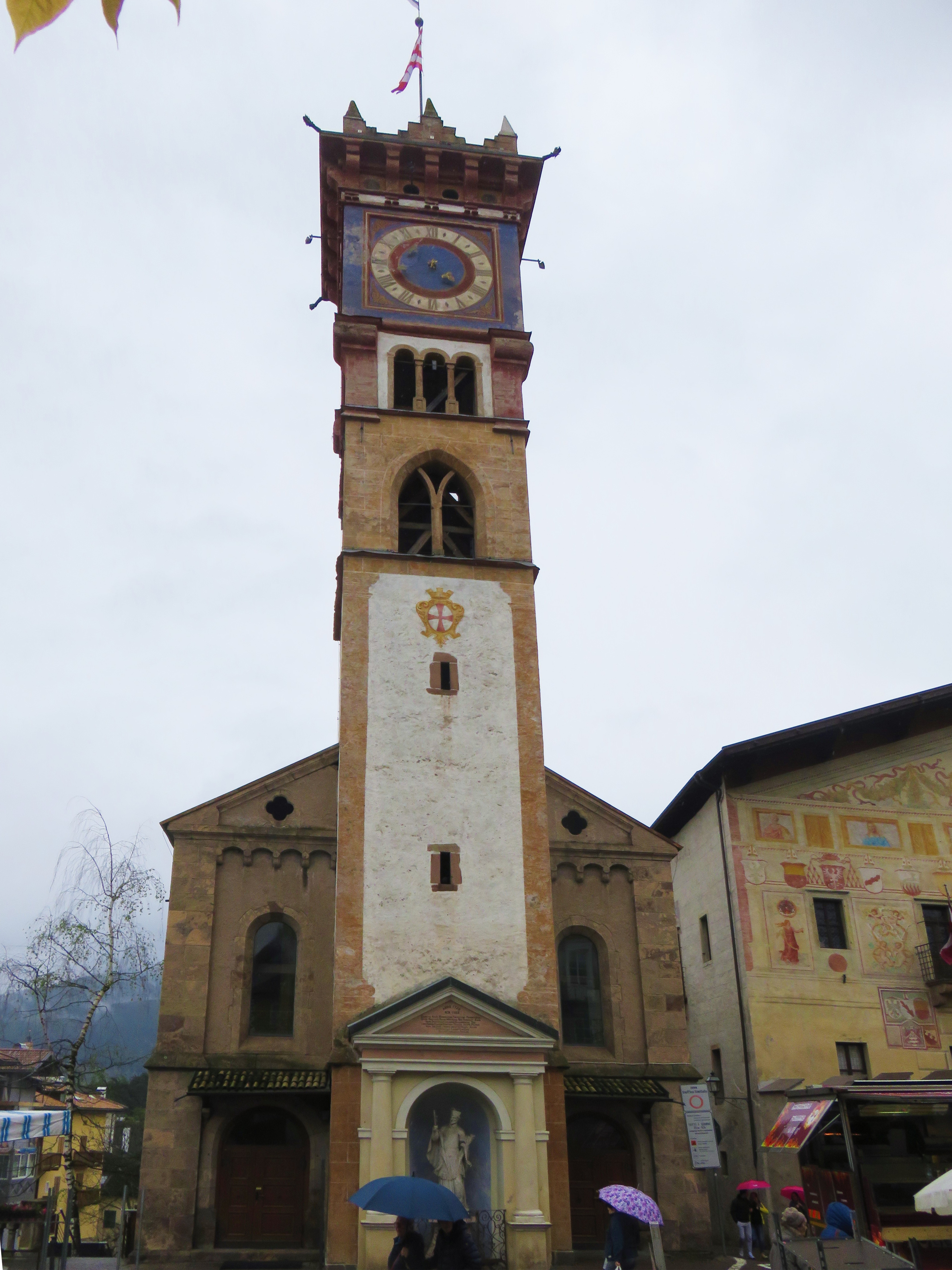 Chiesa di San Sebastiano - Cavalese. Torre campanaria.